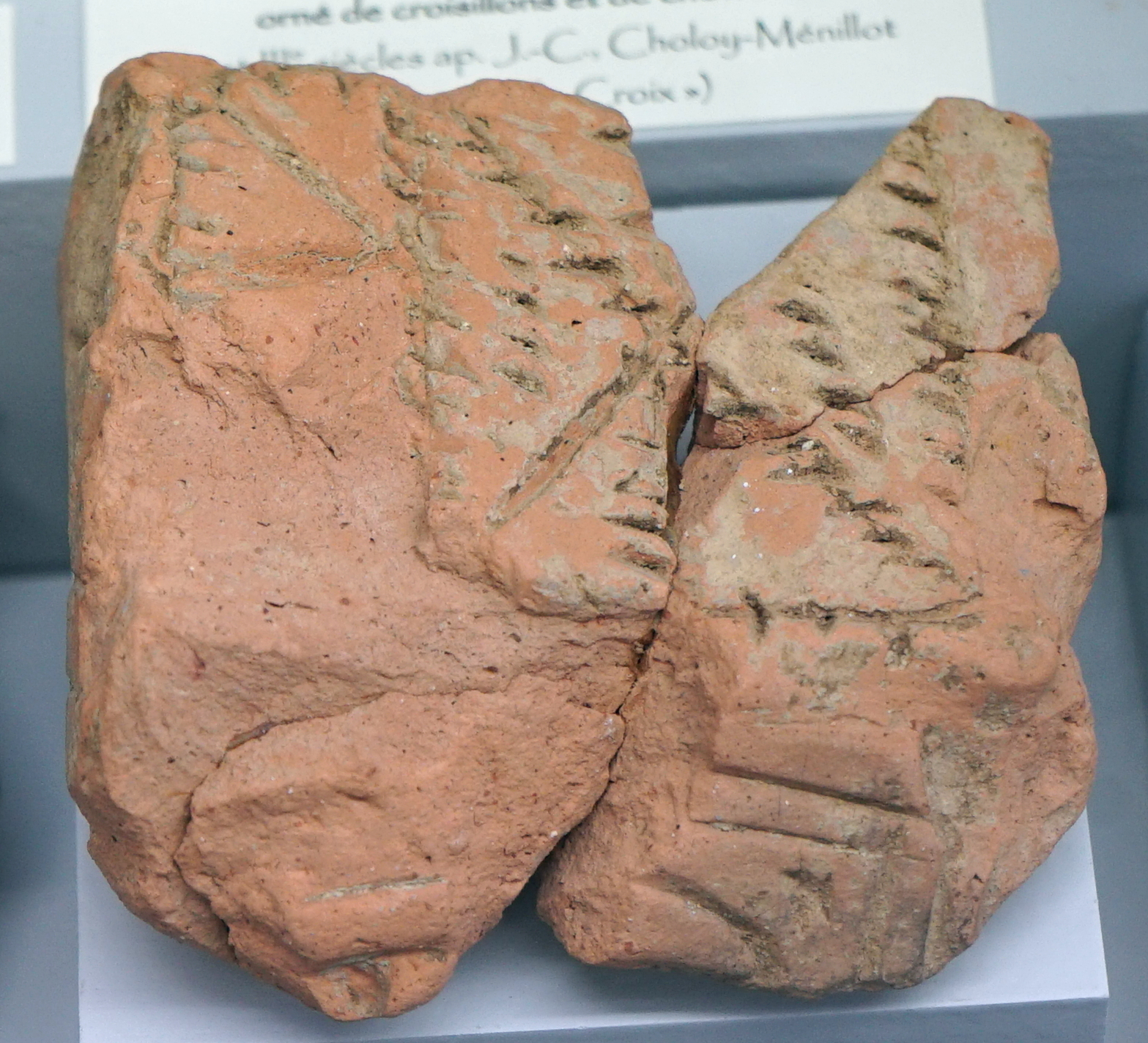 présenté au musée de Toul.